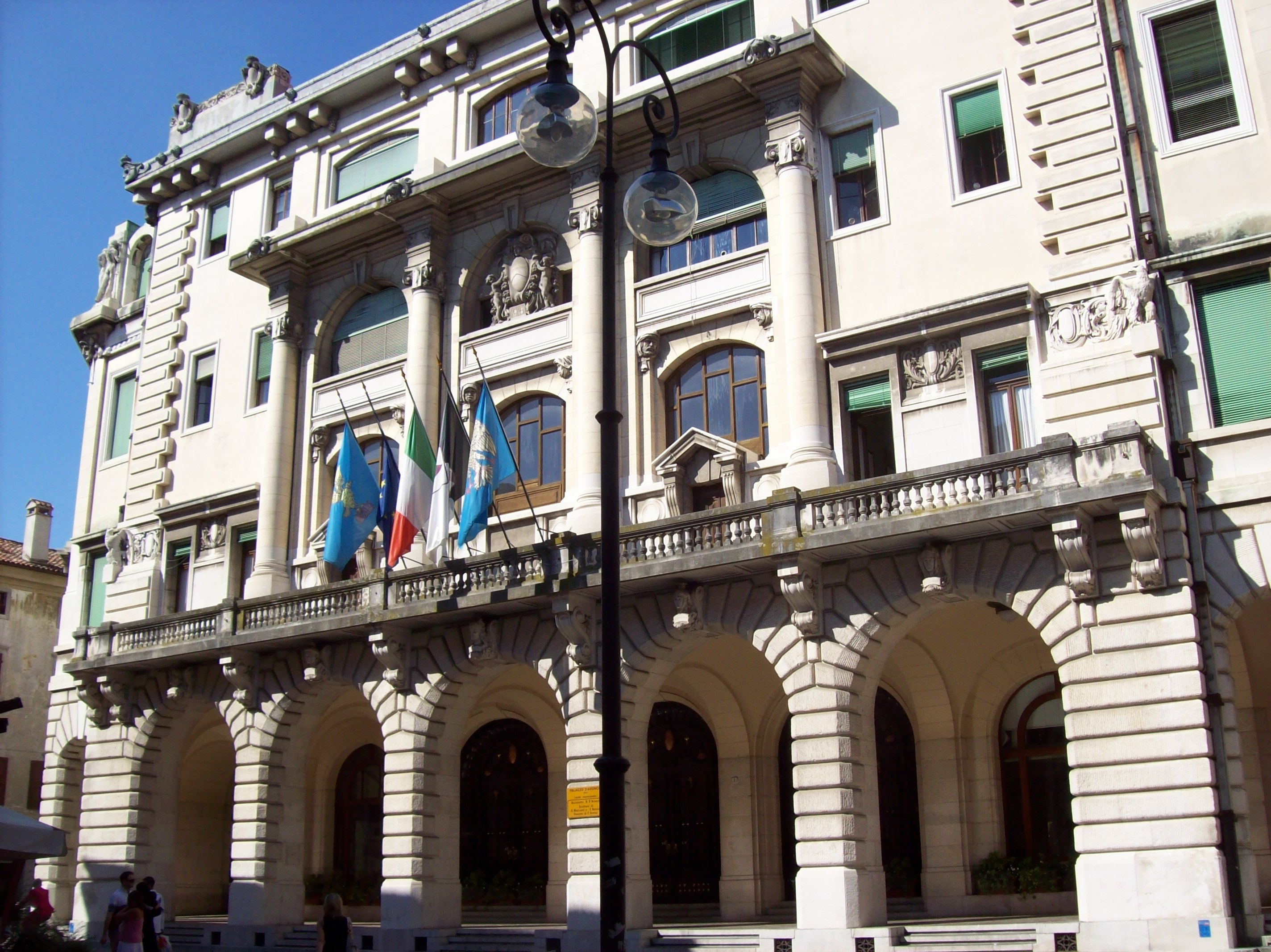 Udine - Palazzo D'Aronco, sede del Comune di Udine, in stile Liberty (1911-1932).